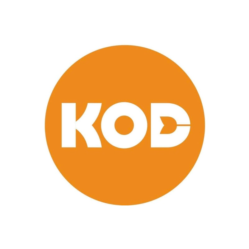 Logo KOD